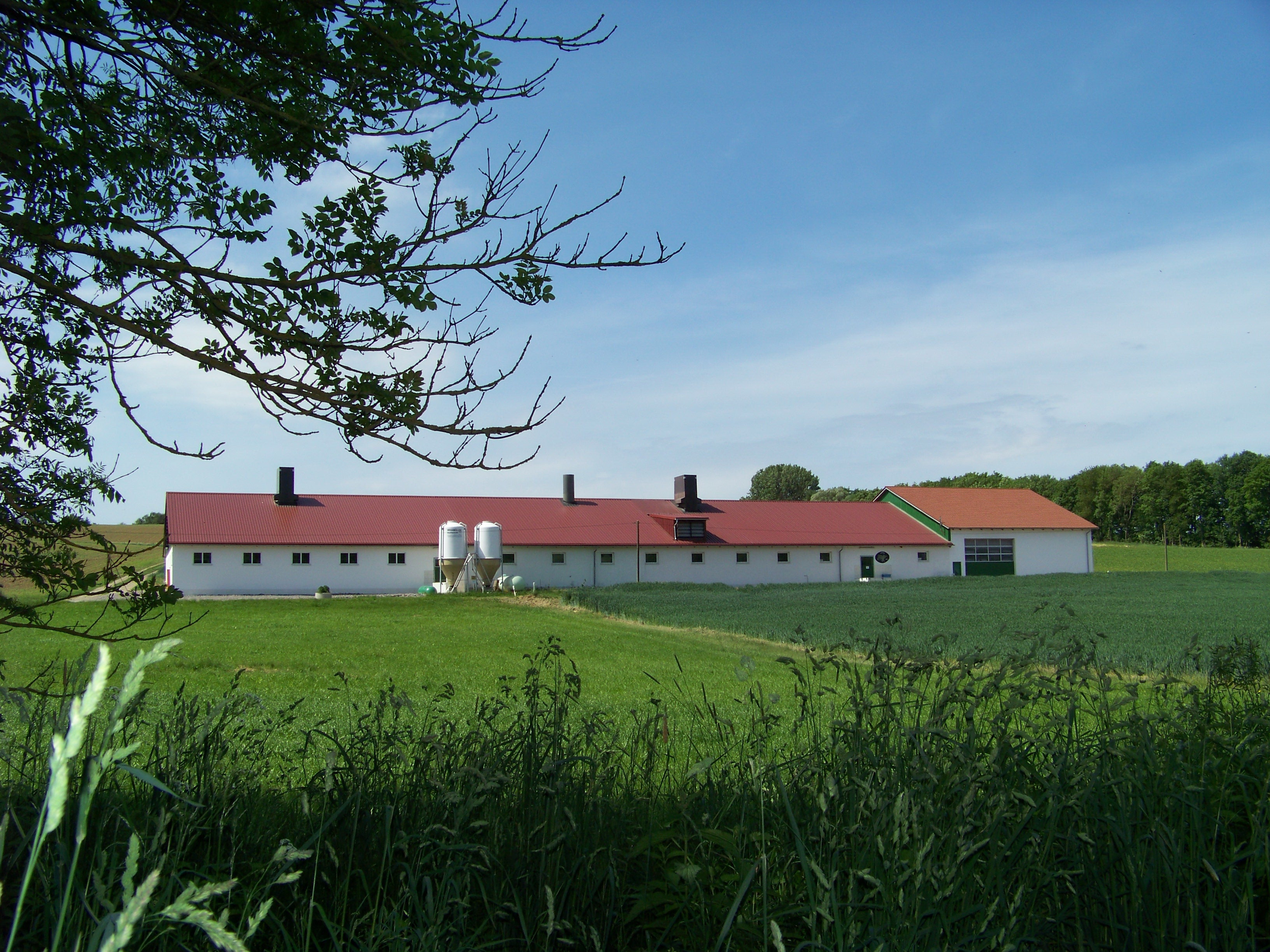 Laberweinting, Hofkirchen. Der Schweinemastbetrieb am Poschenhof.